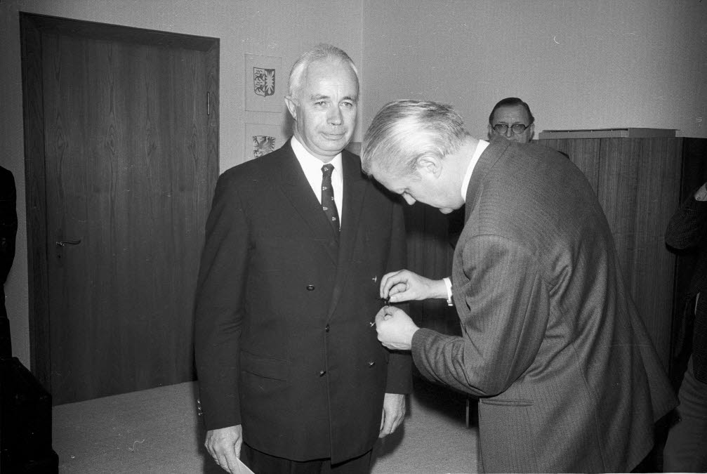 Ministerpräsident Gerhard Stoltenberg überreicht Otto Schlenzka die Auszeichnung für die Organisation der Olympiaregatten.